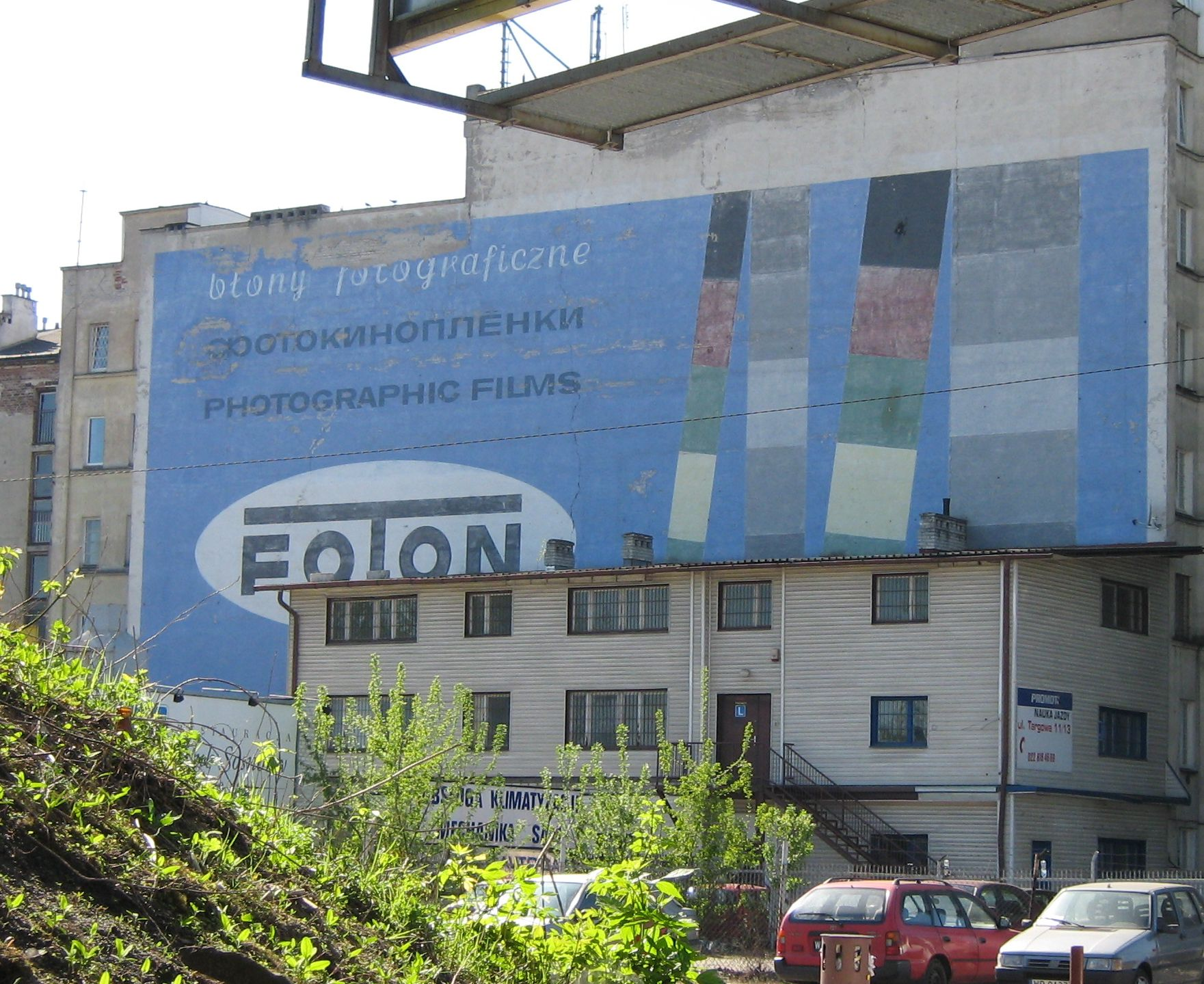 Mural reklamowy z lat 70. XX w. na kamienicy przy Targowej 15 (od Targowej 11/13) "Błony fotograficzne Foton"